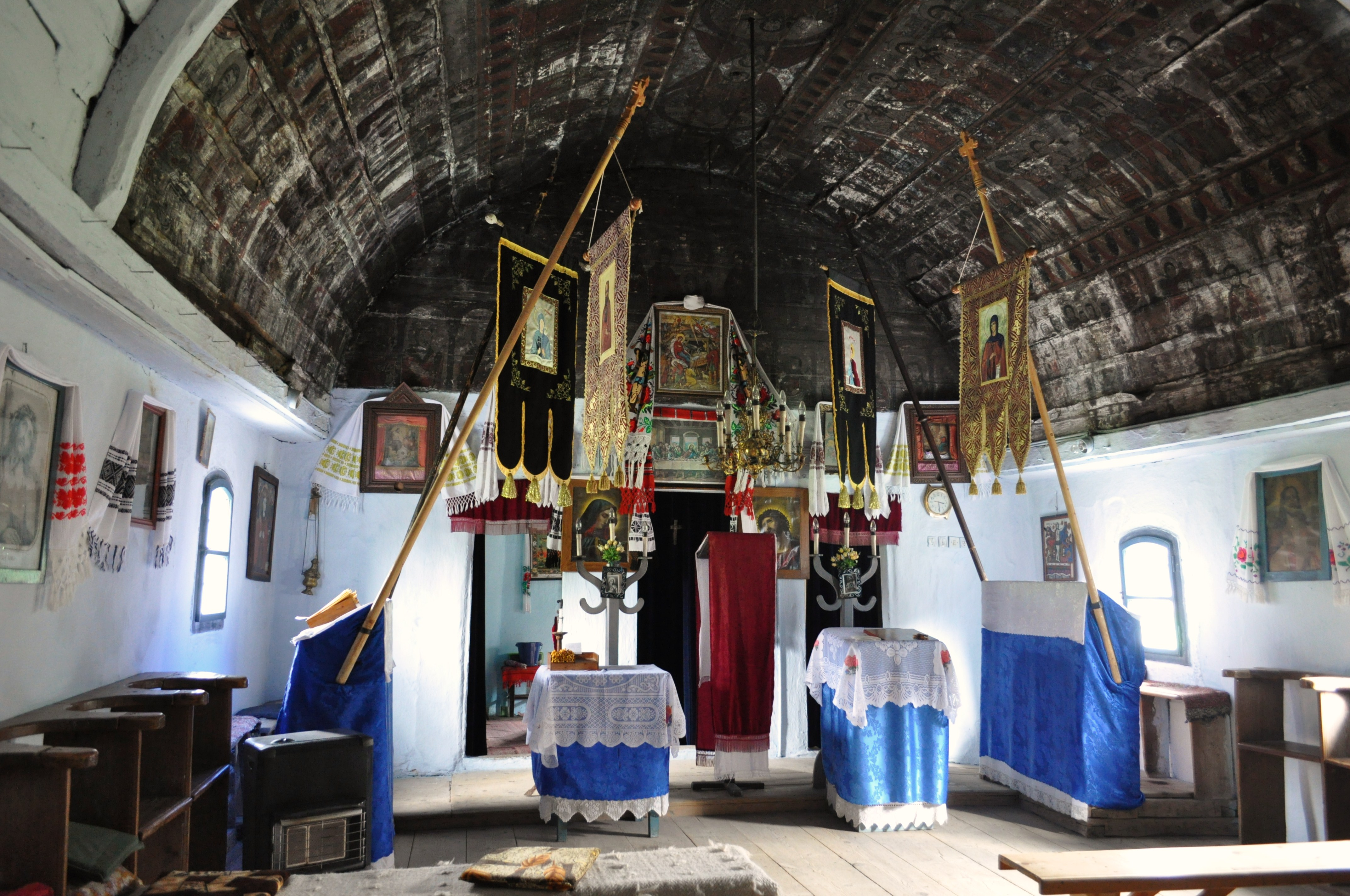 Biserica de lemn „Sfinții Arhangheli” din Surduc, județul Cluj